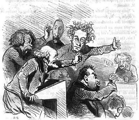 Caricature de Cham représentant la séance du 25 juillet 1848 à l'Assemblée nationale constituante. Des représentants de la Montagne s'animent lors d'une discussion sur les clubs. On reconnaît notamment, de gauche à droite, David d'Angers, Bernard Sarrans, Isidore Buvignier, Germain Sarrut et Antony Thouret. A la tribune, Armand Marrast préside la séance.